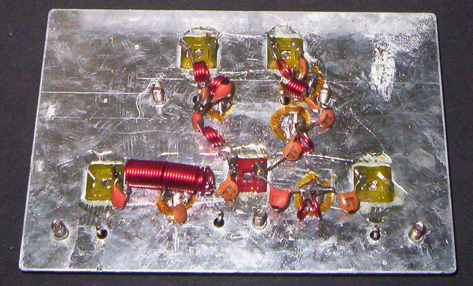 Antennenweiche (Mastweiche) zur Zusammenführung der Frequenzen verschiedener Antennen / antenna splitter for combining of different frequencies from different antennas (detailed)